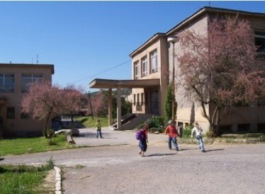 obrázok základnej školy